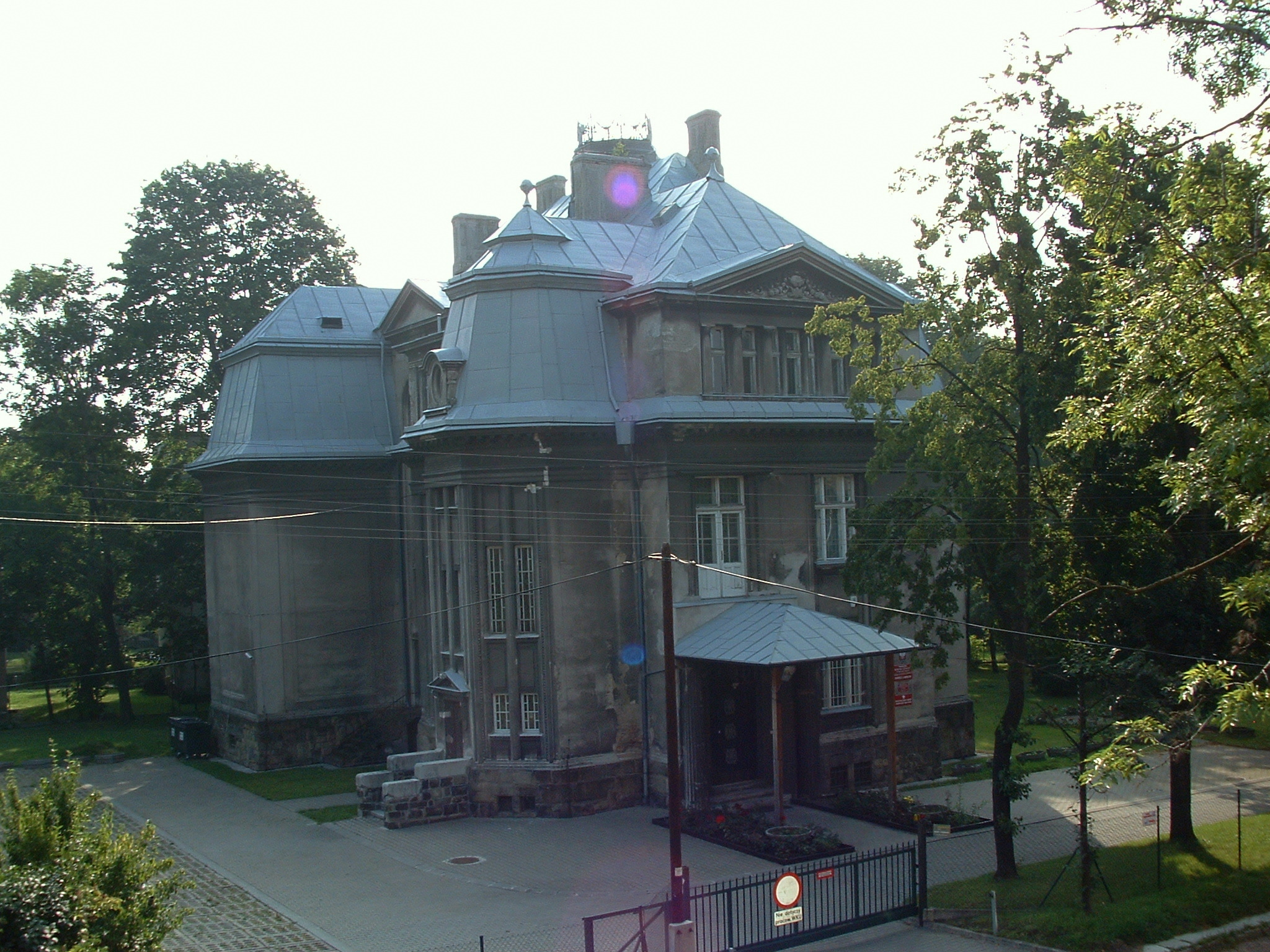 Budynek Wojskowej Komendy Uzupełnień w Bielsku-Białej